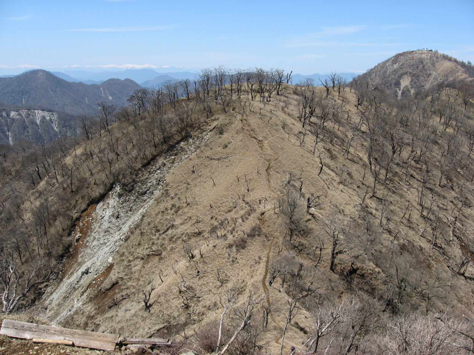 不動ノ峰付近より棚沢ノ頭